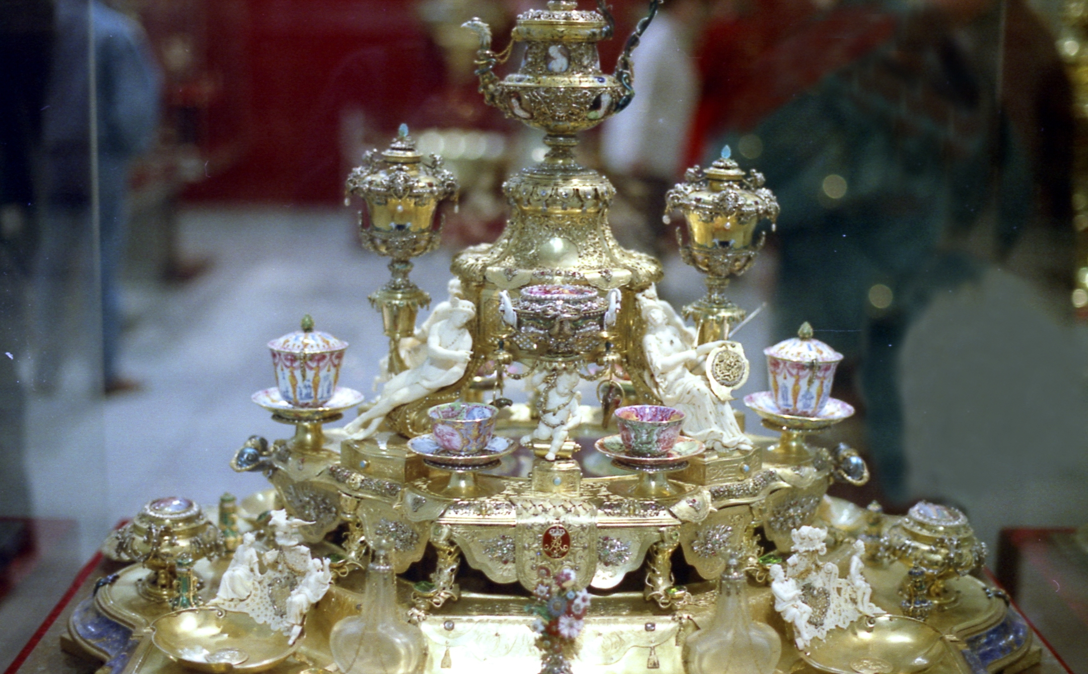 Das Goldene Kaffeezeug (original: Pretiosen Coffe Zeug), von Johann Melchior Dinglinger, entstanden 1697–1701